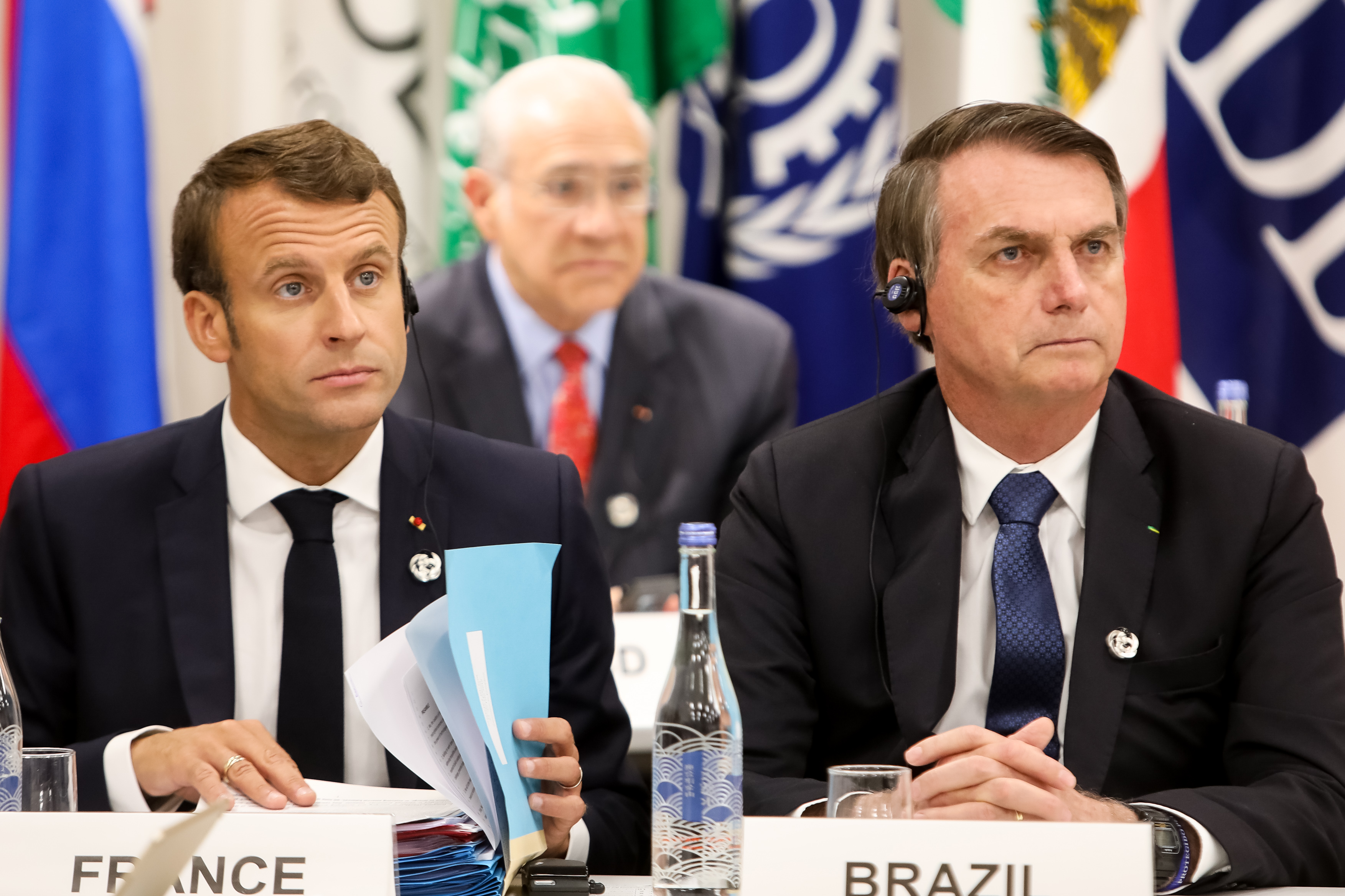 (Osaka - Japão, 28/06/2019) Presidente da República, Jair Bolsonaro, durante Reunião Paralela dos Líderes do G20, sobre Economia Digital. Foto: Clauber Cleber Caetano/PR